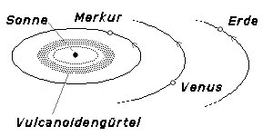 Schema des Vulcanoidengürtels